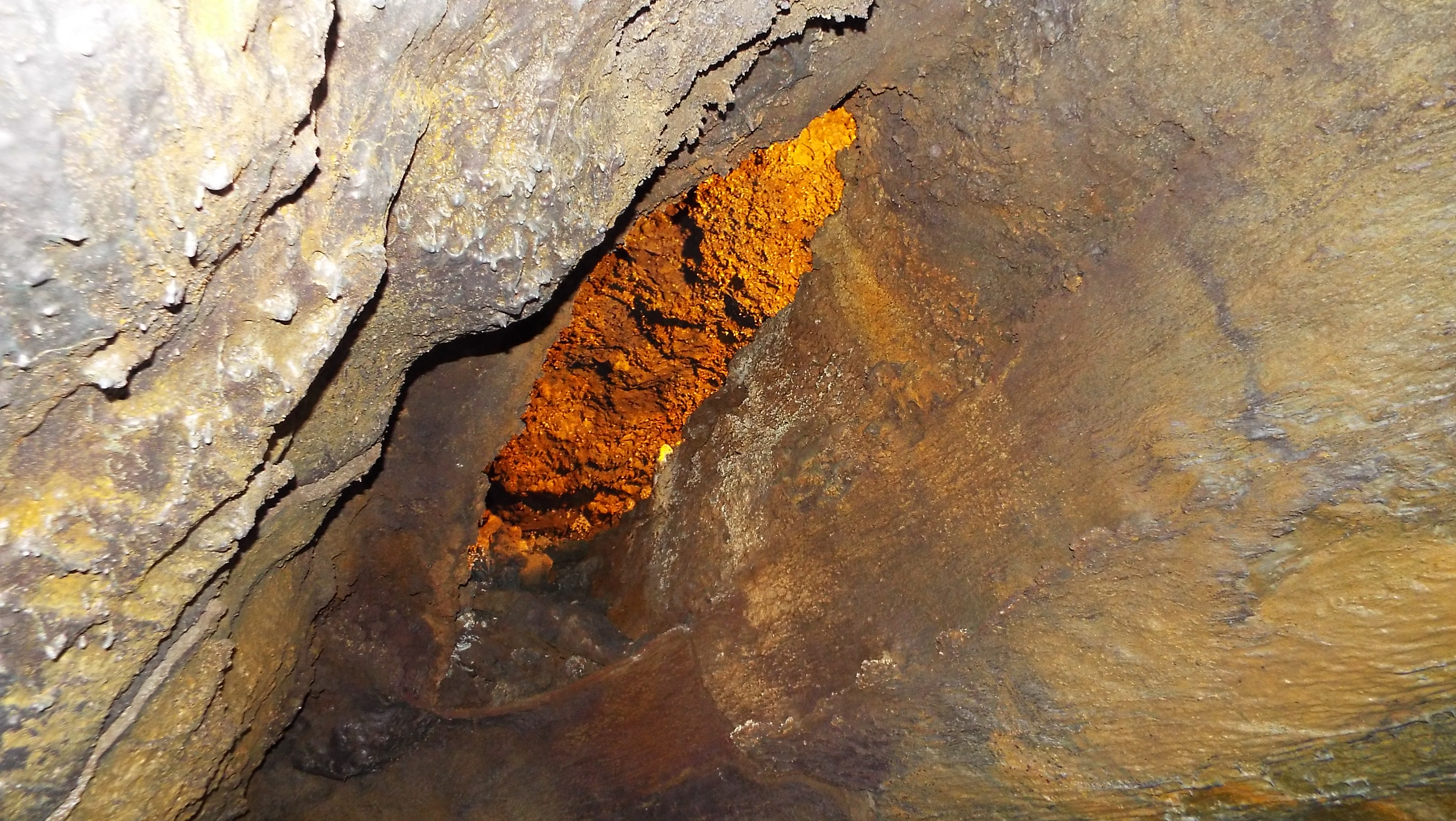 Auf der Azoreninsel Sao Miguel in der Hauptstadt Ponta Delgada liegt im nordwestliochen Stadtgebiet Gruta do Carvão. An dem Wänden des Lavaabflusskanals haben sich Schwefelverbindungen abgelagert, die gelb schillern.